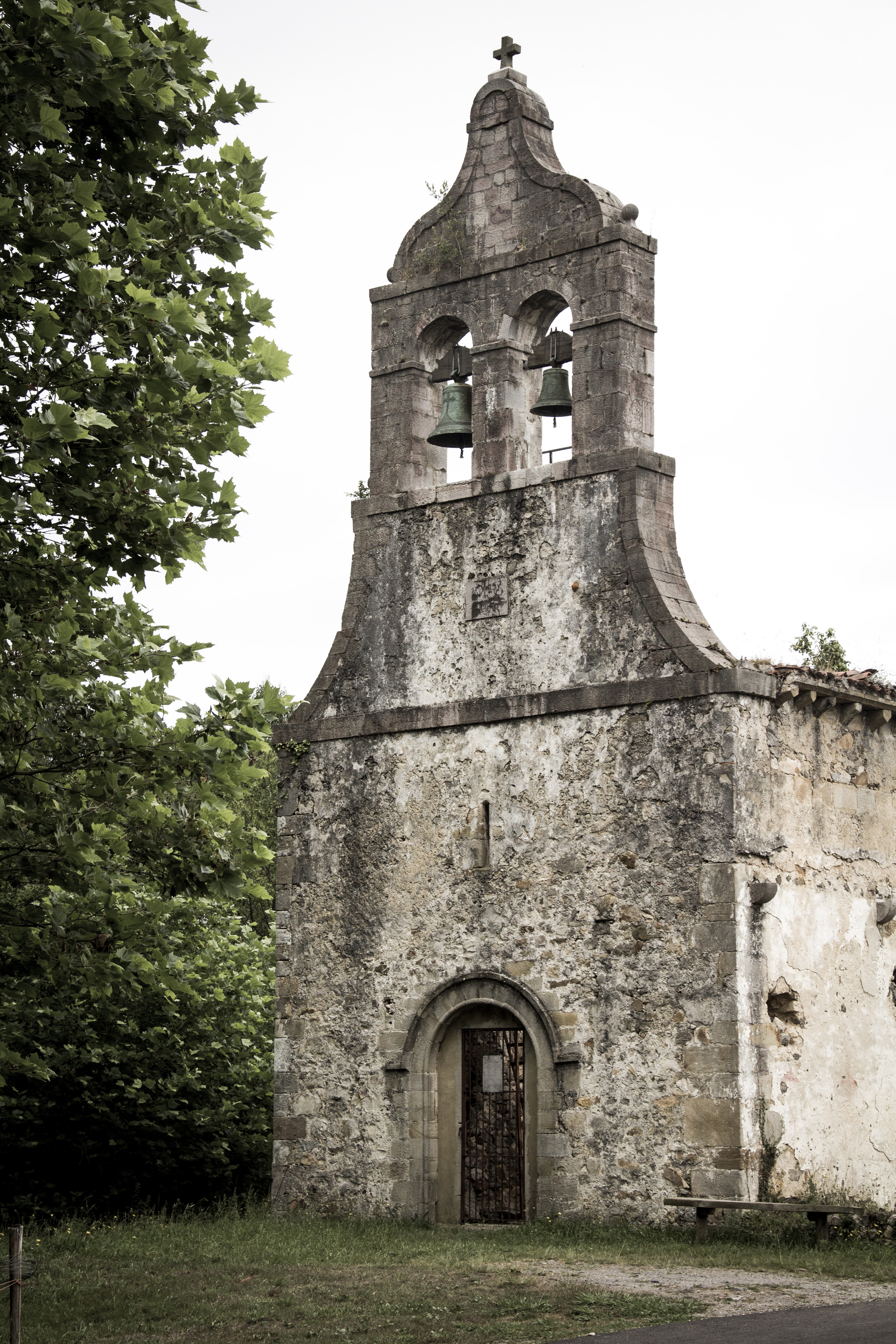 Iglesia románica de San Salvador de Moru